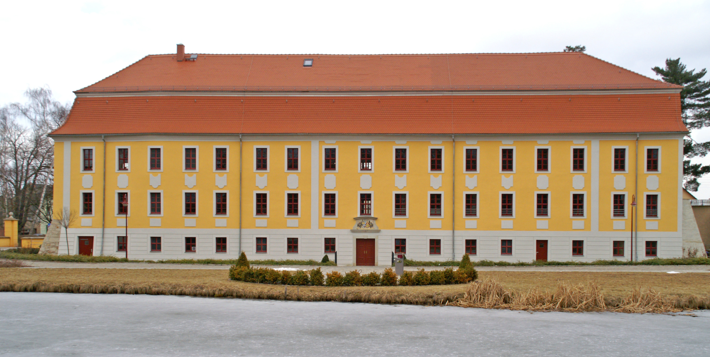 Rittergut Treben (Thüringen)